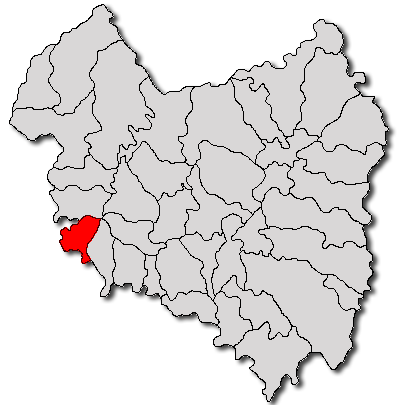 Categorie:Hărţi ale judeţului Covasna